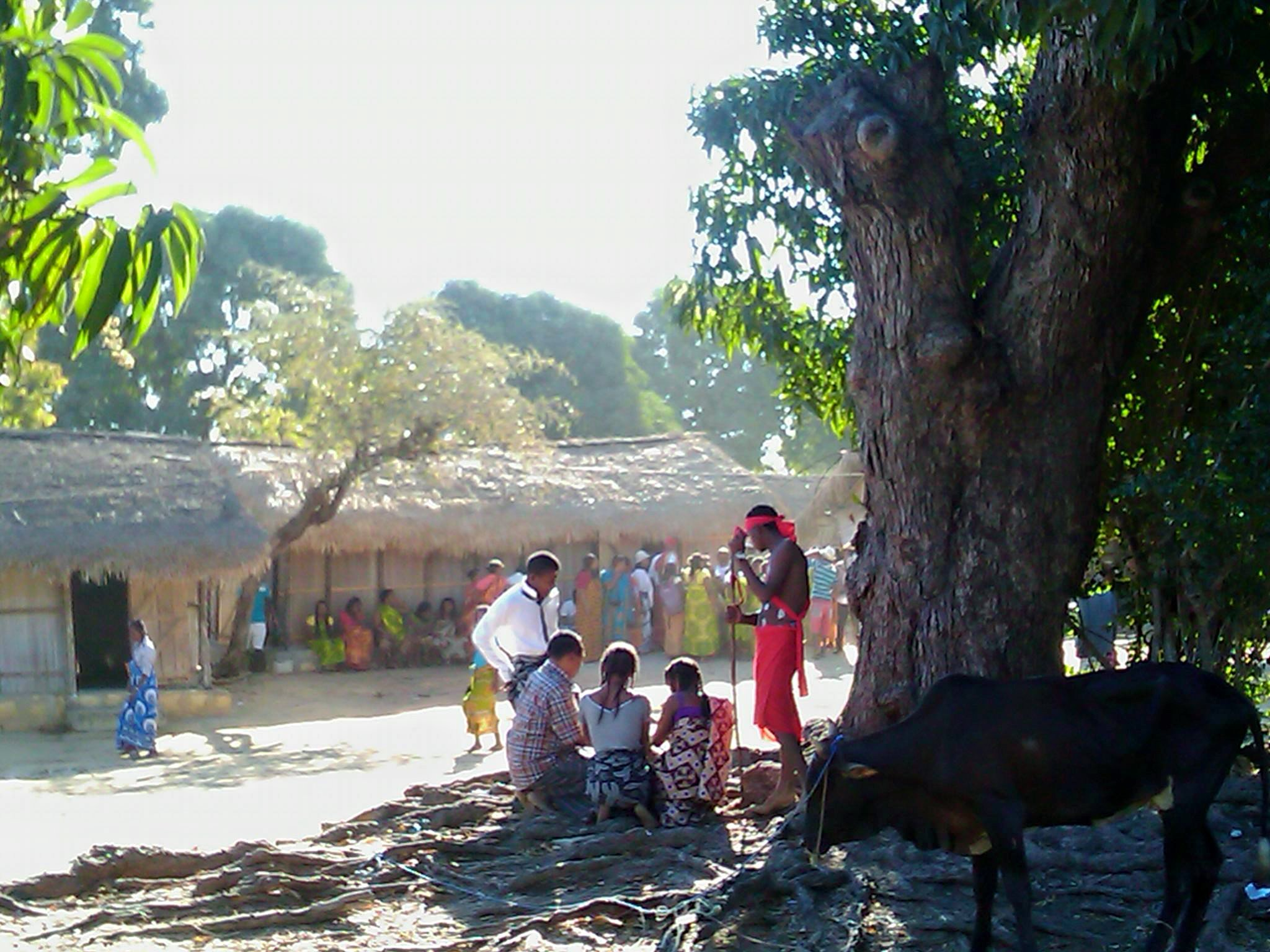 mahajanga, Madagascar, cérémonie de Tromba